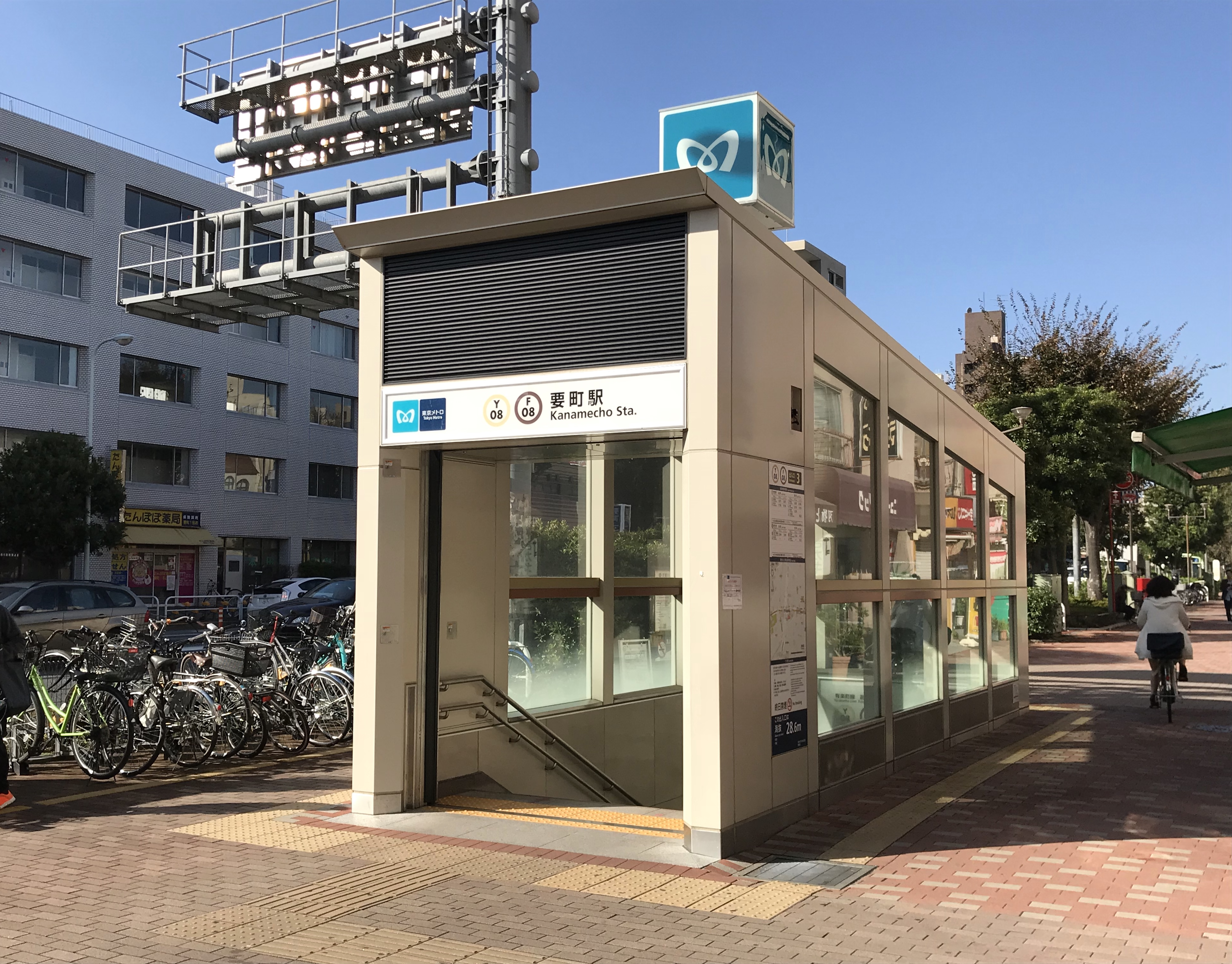 東京メトロ有楽町線・副都心線要町駅3番出入口（リニューアル後）